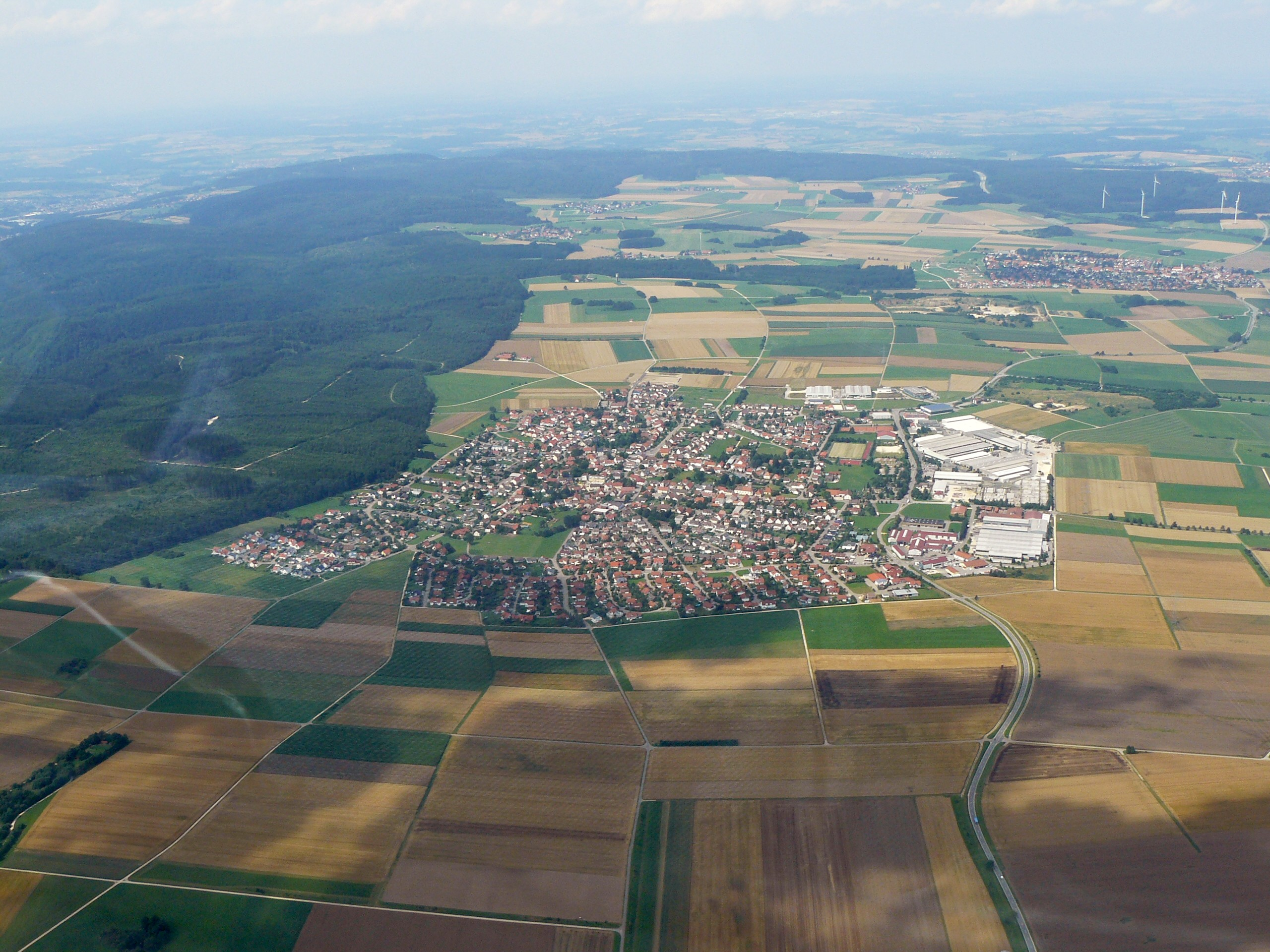 Aalen-Ebnat aus südlicher Richtung gesehen